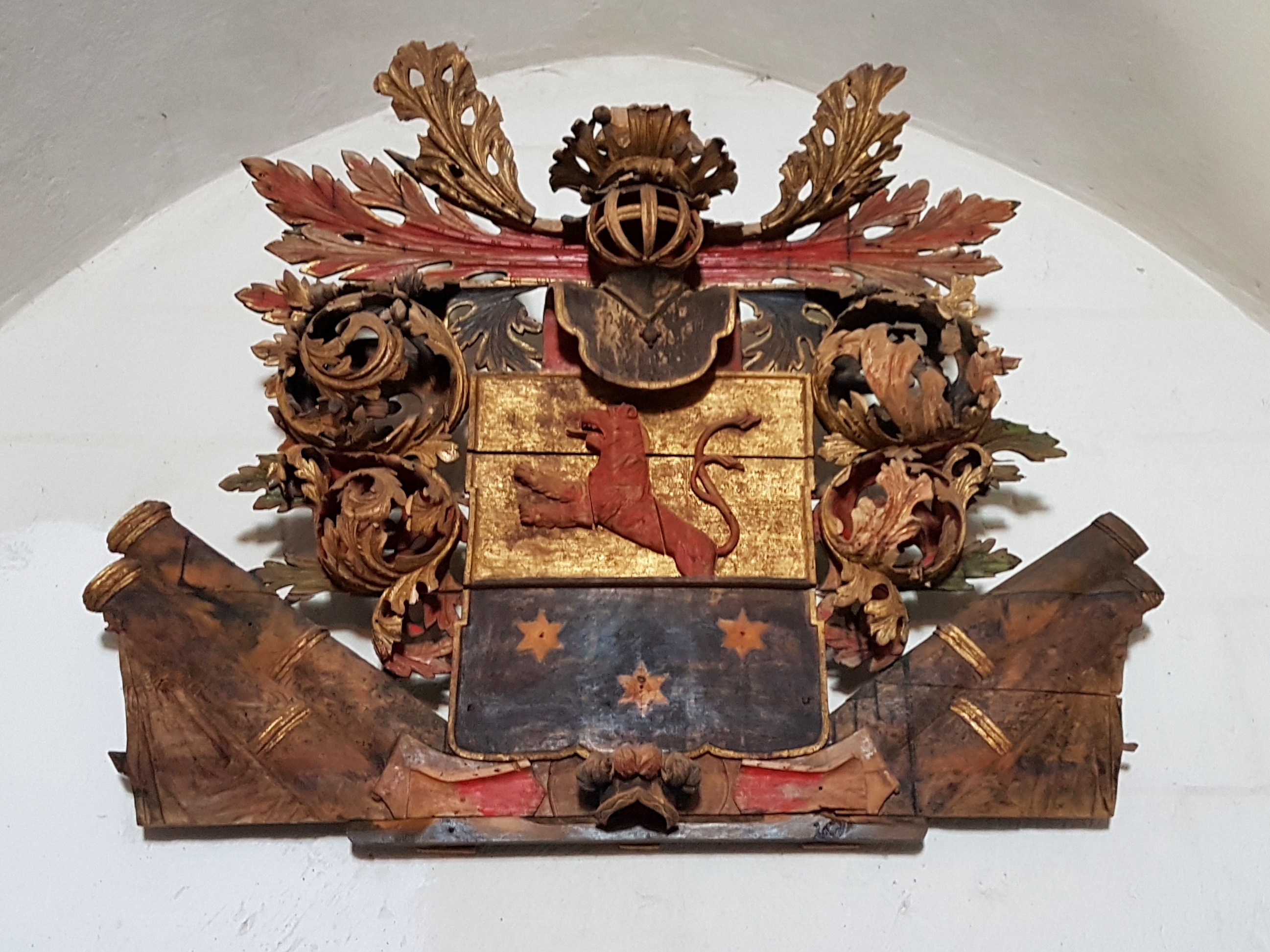 Maanõunik Friedrich von Sassi (surnud 1689) vappepitaaf Valjala kirikust. Asub praegu Saaremaa Muuseumi püsiekspositsioonis Kuressaare linnuses.